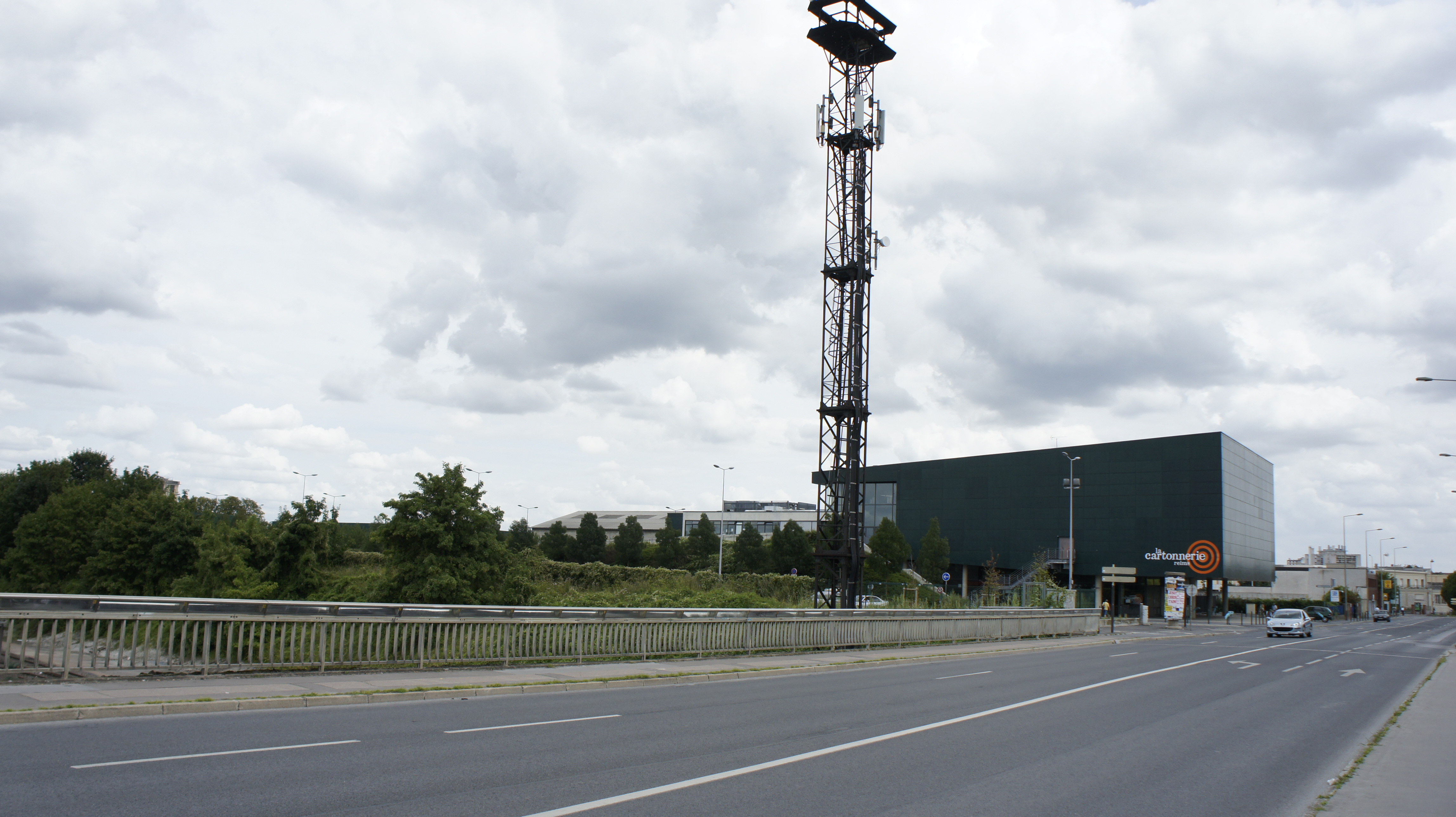 Une vue des bâtiments de La Cartonnerie scène musicale à Reims .